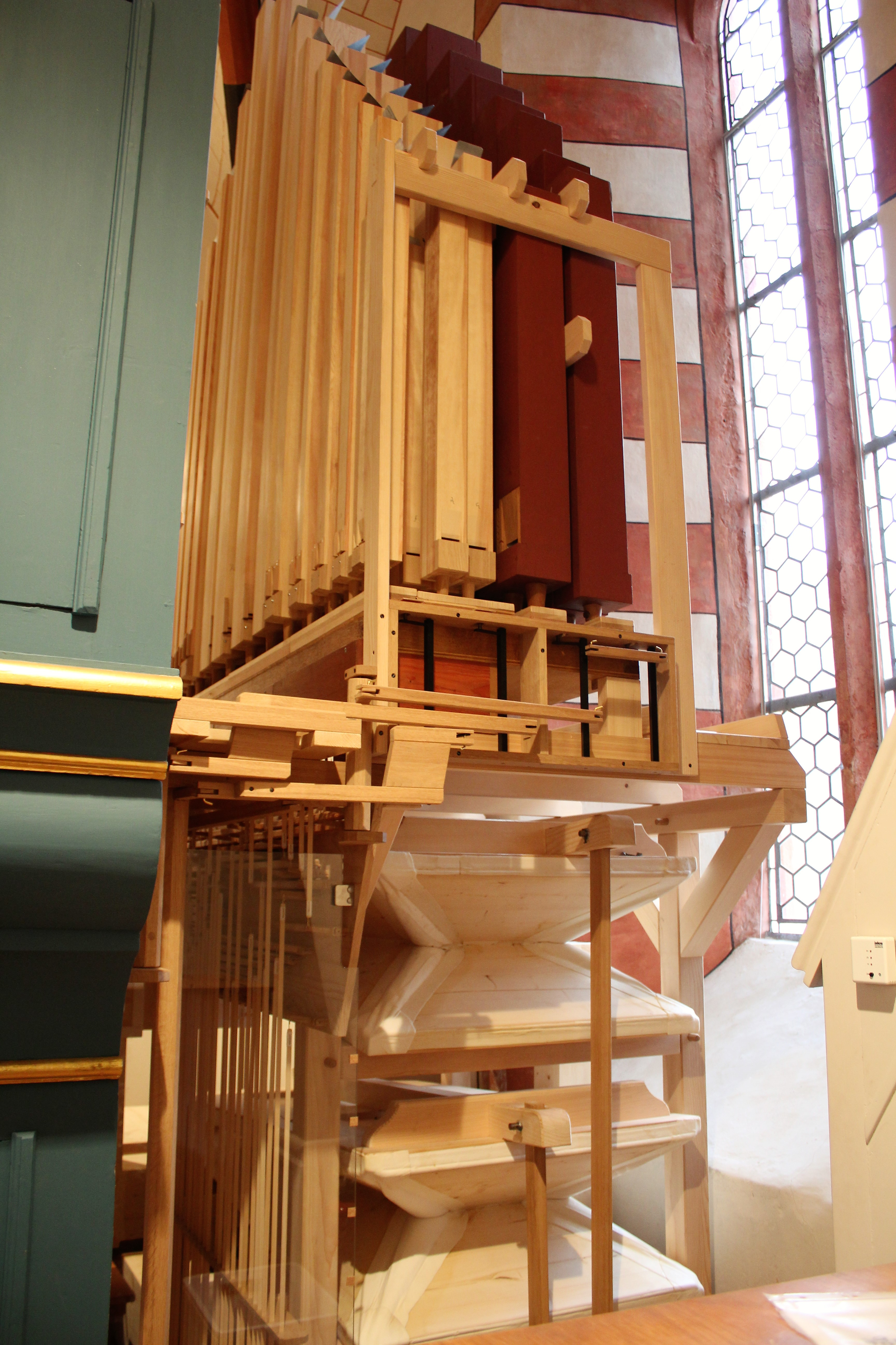 Evanglische Kirche Rüdigheim (Neuberg), Main-Kinzig-Kreis, Hessen, Deutschland